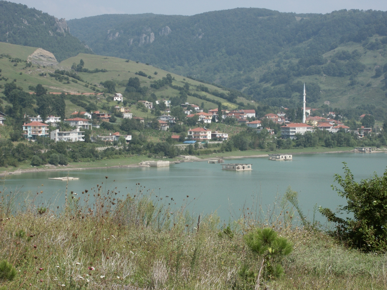 Ova Köyü görünüm